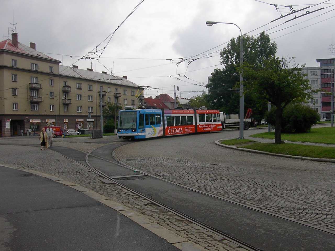 Astra na lince 1 na náměstí Milady Horákové.